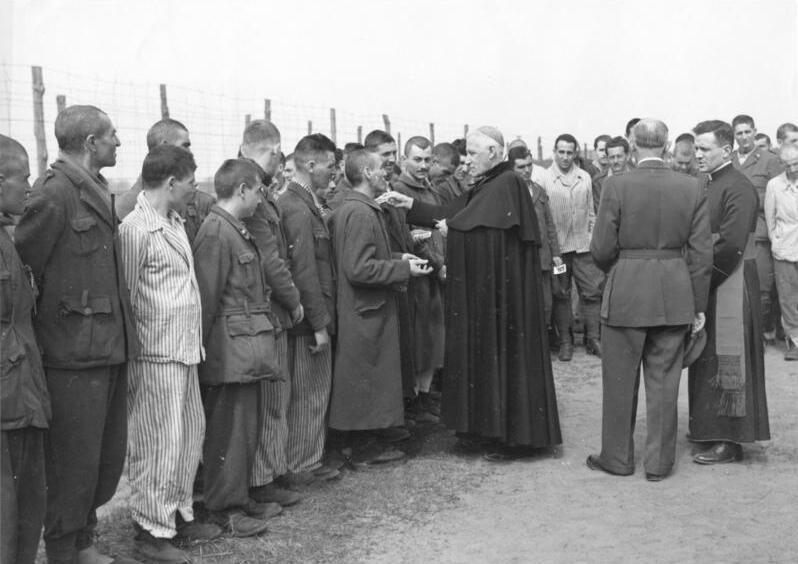 Päpstlicher Nuntius besucht Kriegsgefangenenlager Der päpstliche Nuntius in Berlin, Msgr. Orsenigo, besuchte ein Kriegsgefangenenlager, wo er den Insassen die Heilige Kommunion erteilt. UBz.: Im Krankenrevier des Lagers unterhält sich der Nuntius mit genesenden Kriegsgefangenen und schenkt ihnen gesegnete Heiligenbilder.